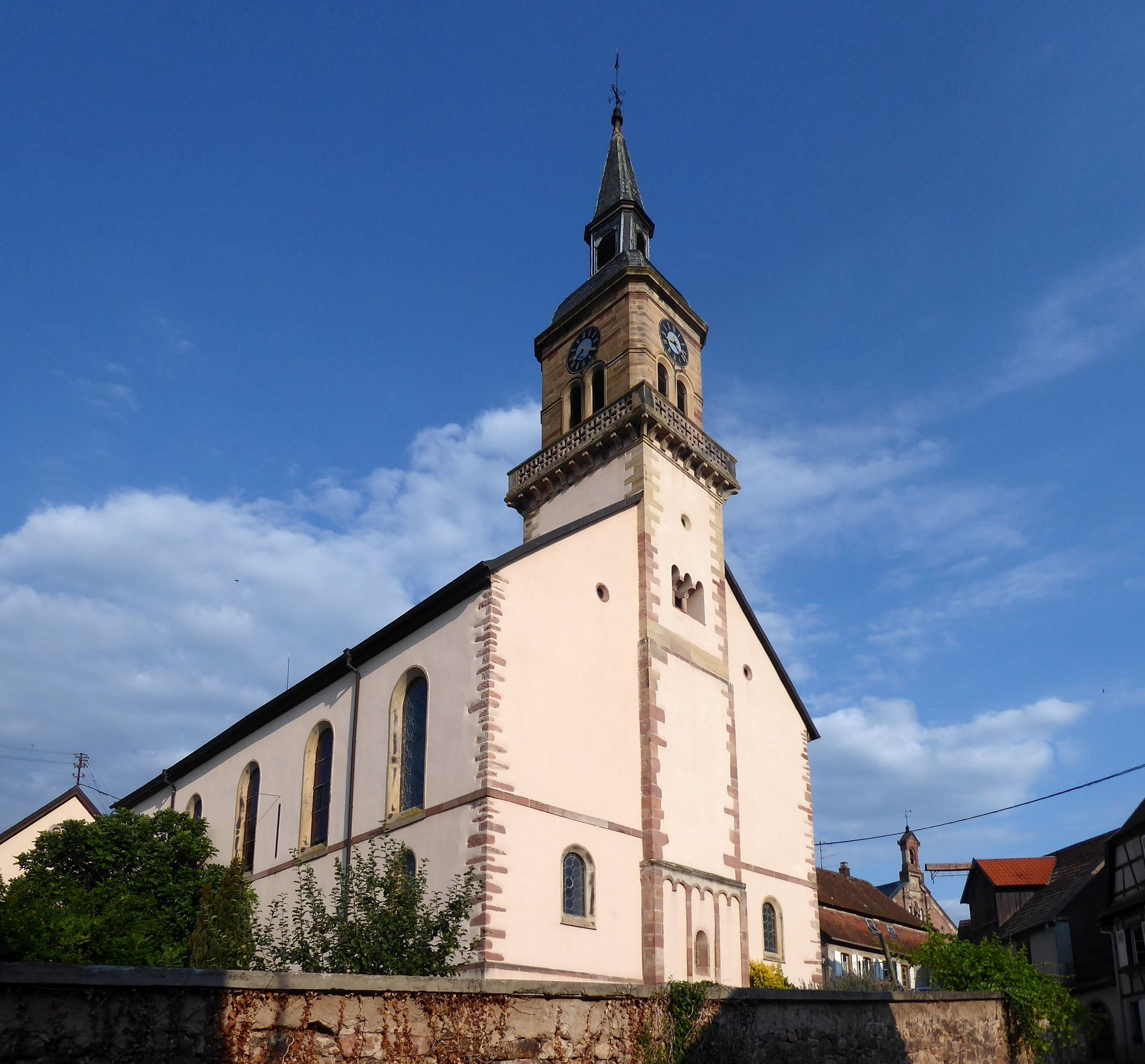 Église Saint-Jean-Baptiste de Heiligenstein